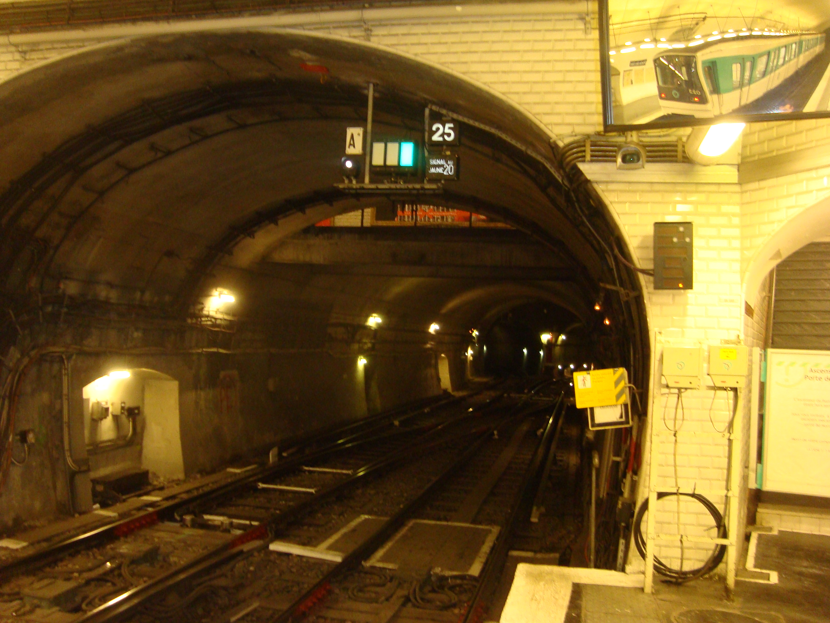 Voie de retournement vu du quai de la station Porte des Lilas sur la ligne 3bis.